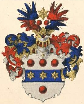 Sieversi suguvõsa aadlivapp